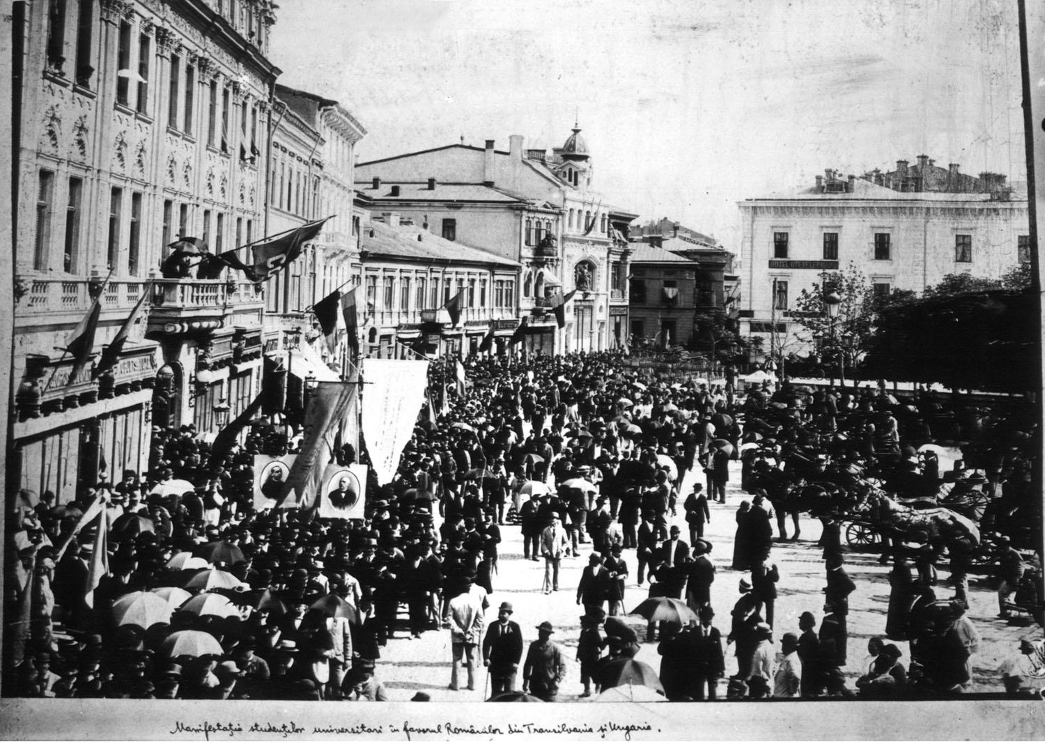 Manifestaţia studenţilor universitari în favorul Românilor din Transilvania şi Ungaria Piaţa Teatrului, Bucharest